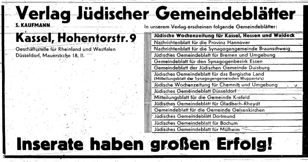 Verlagsanzeige Sally Kaufmann, 13. März 1931